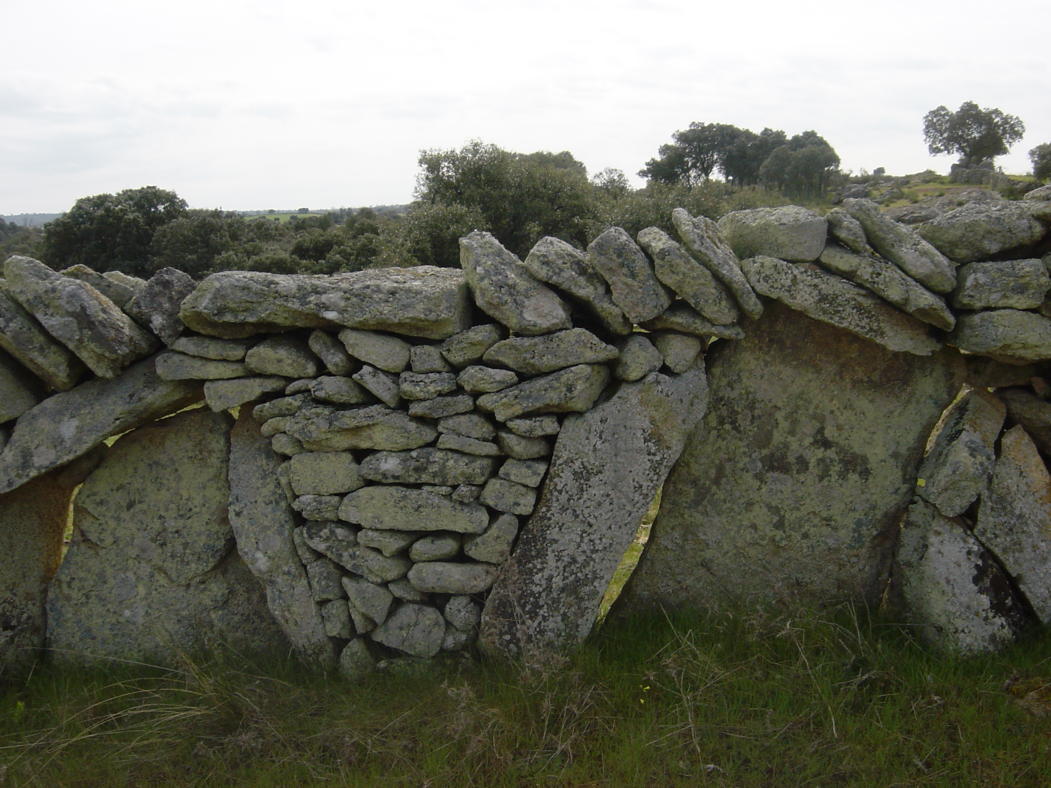 CERCAS DE PIEDRA DE SAYAGO, ESPAÑA